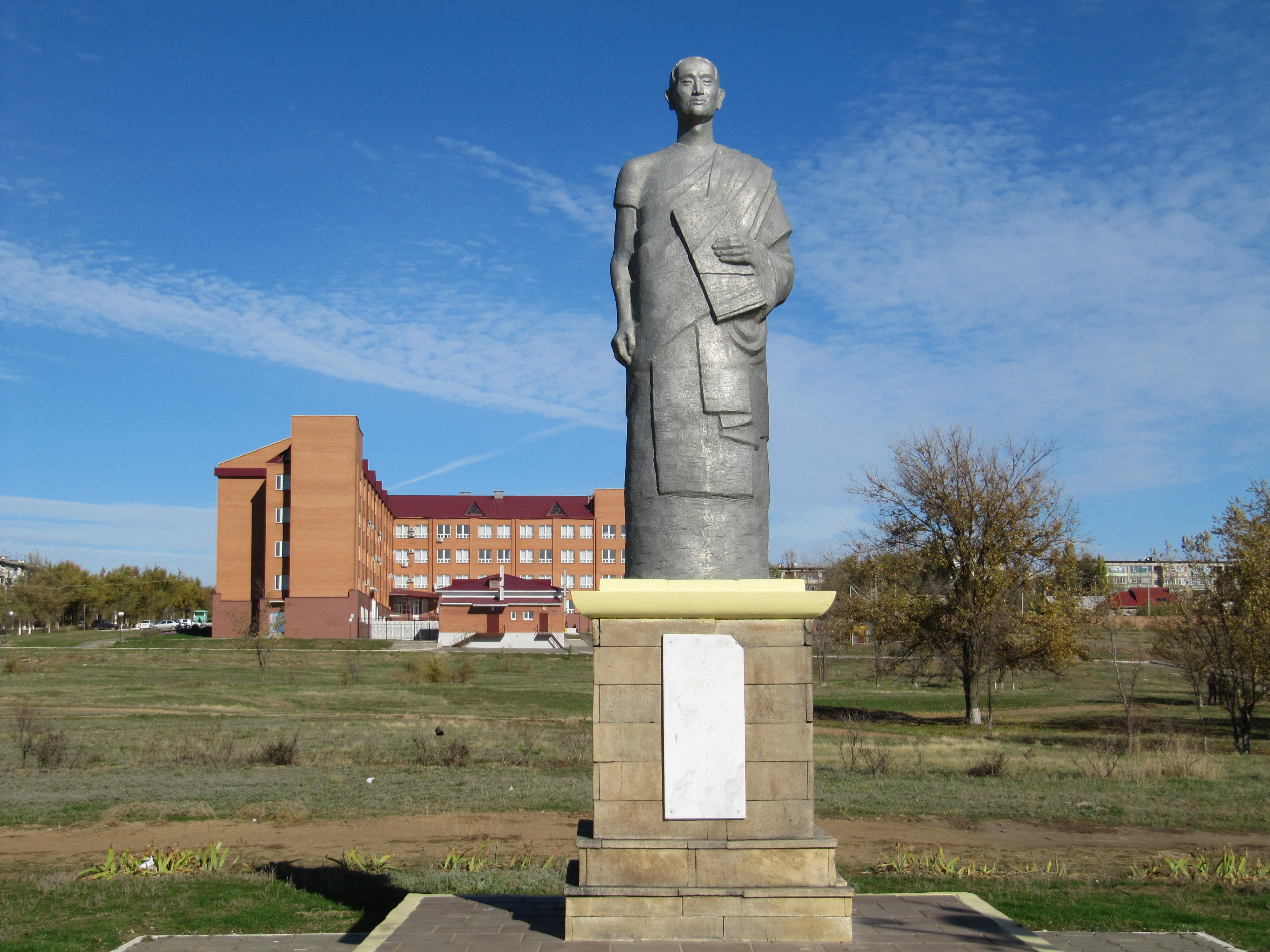 Памятник Зая-Пандите, Элиста, Калмыкия